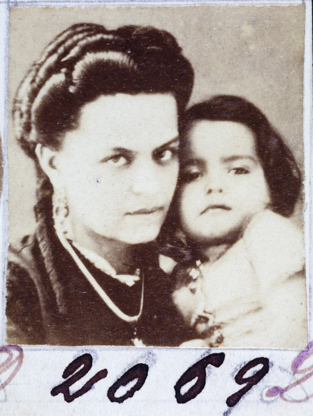 Obra que integra o acervo do Museu Paulista da USP. Coleção Militão Augusto de Azevedo.